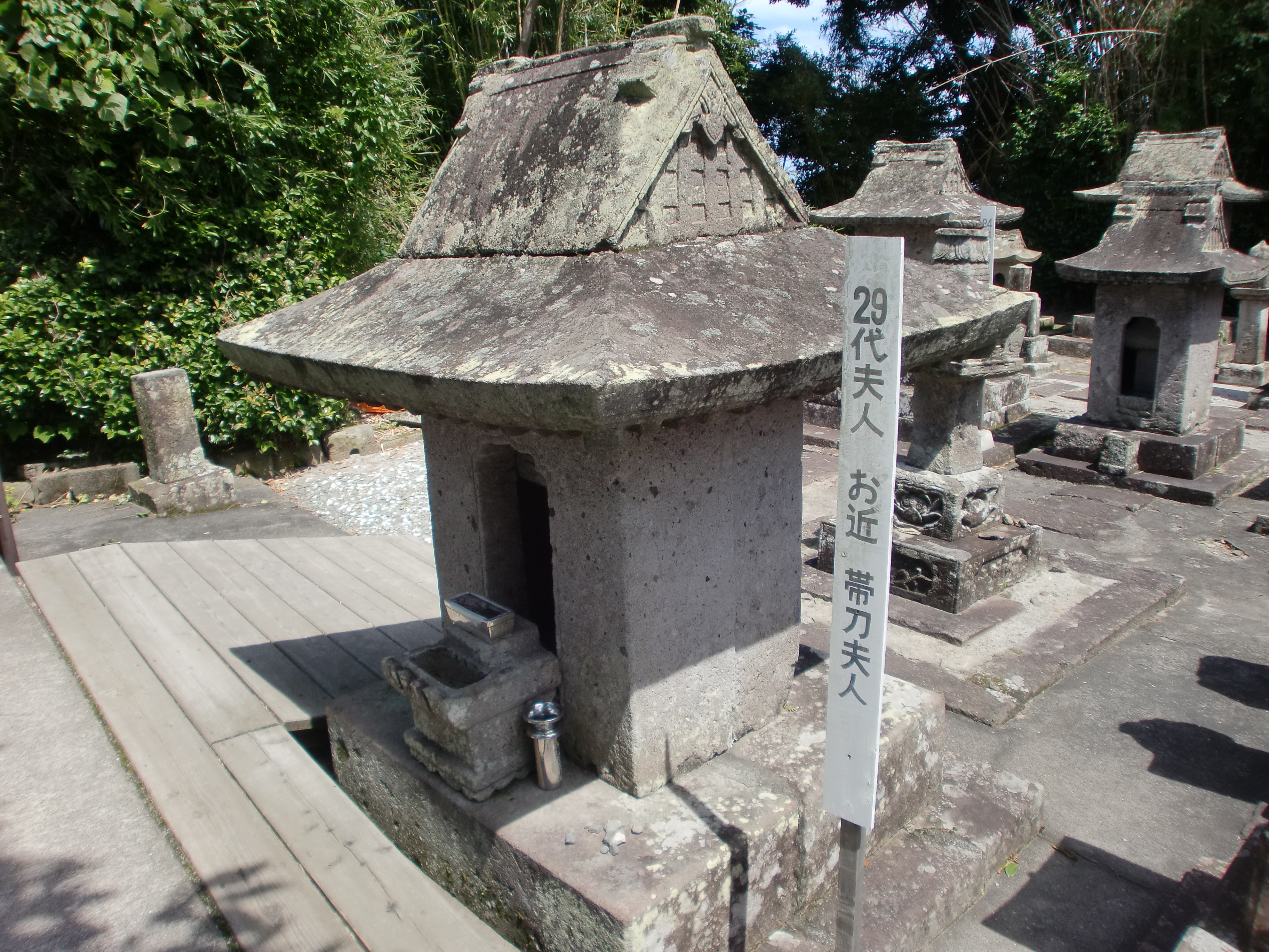 鹿児島県日置市日吉町吉利の禰寝・小松家歴代墓所にある小松近の墓。